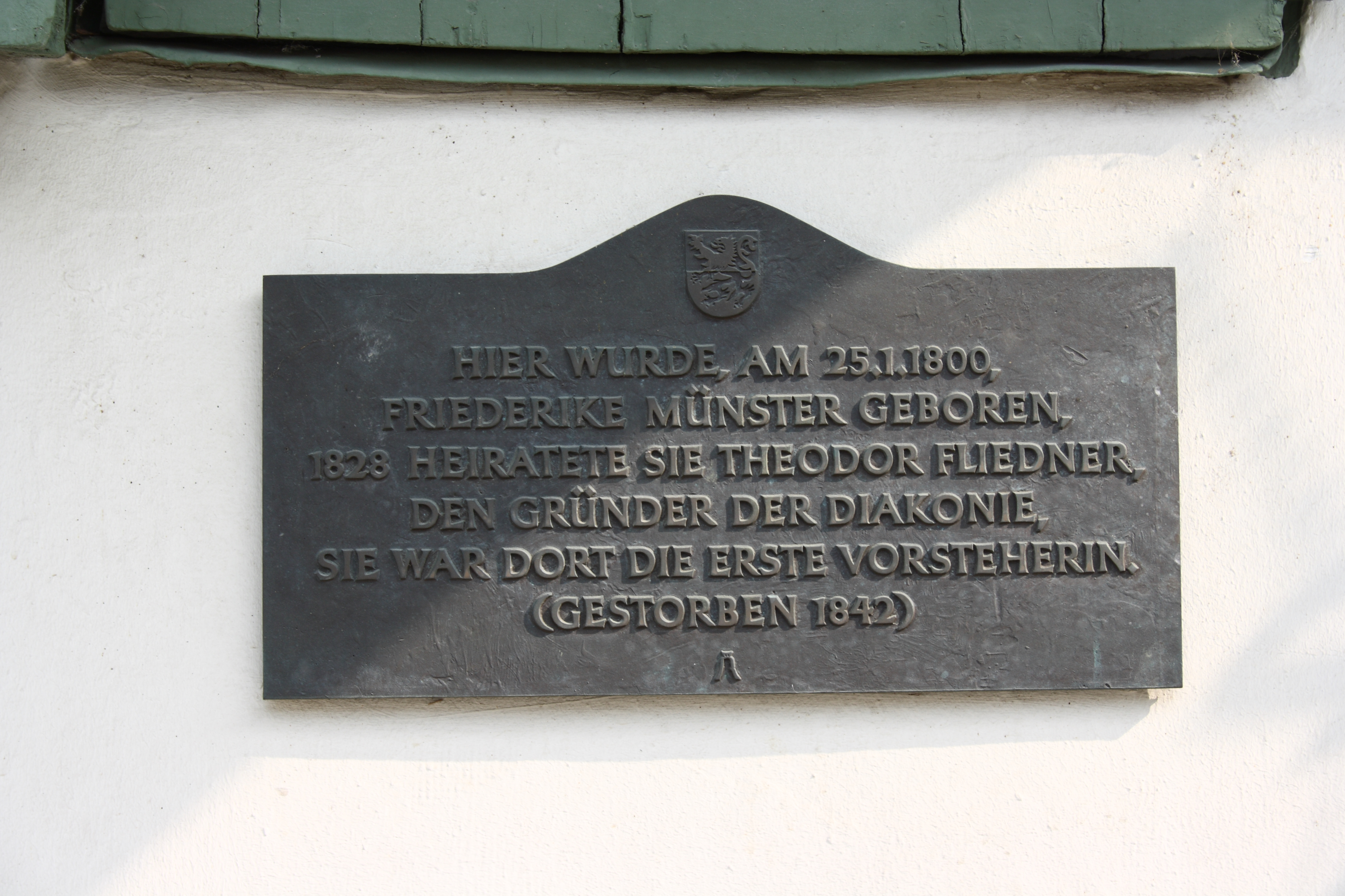 Tafel für Friederike Fliedner am Haus Burgweg 10 in Braunfels im Lahn-Dill-Kreis (Hessen)